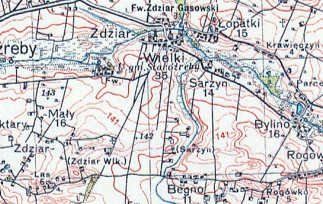 Zdziary na mapie Wojskowego Instytutu Geograficznego z 1935 r.